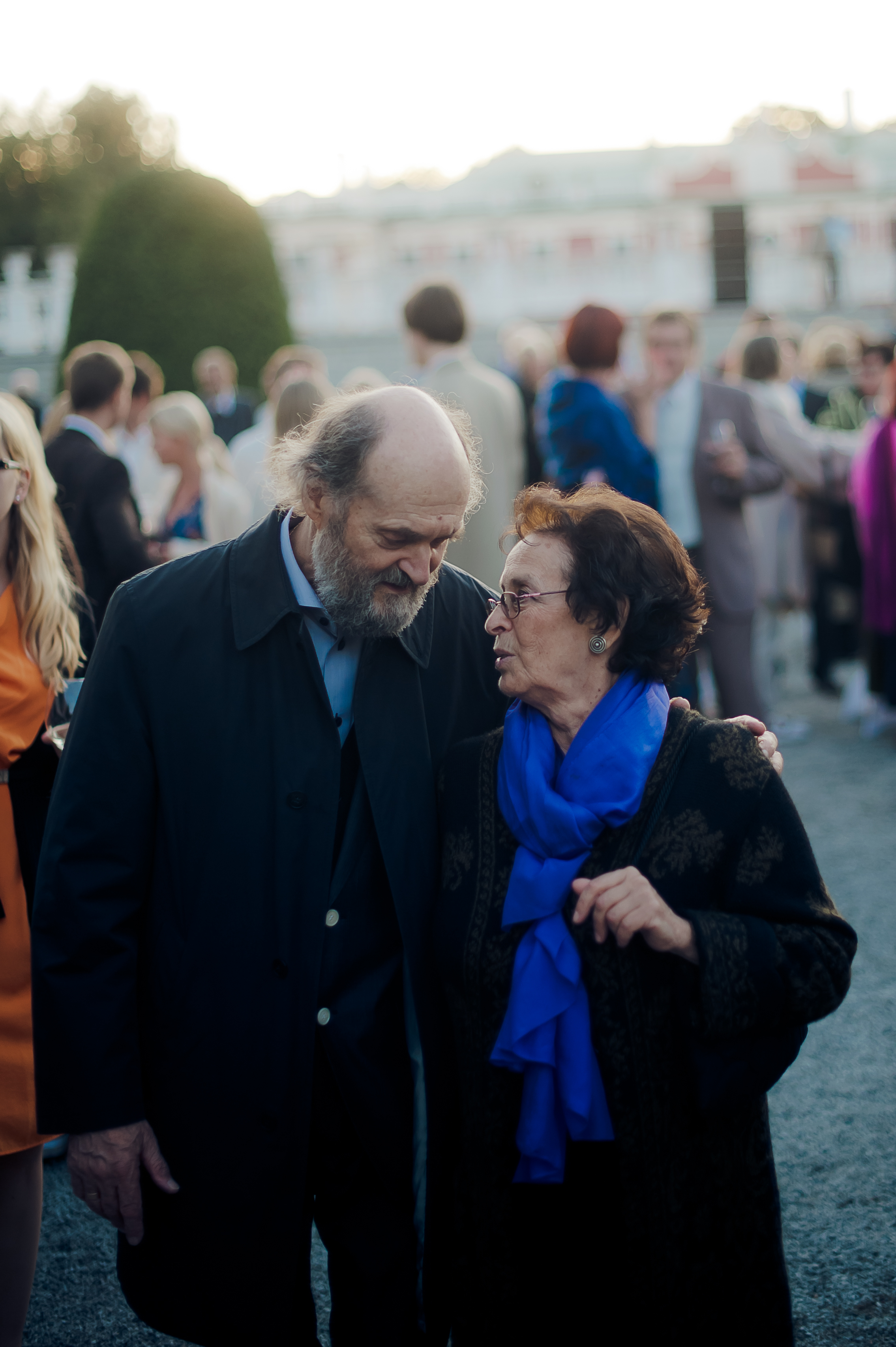 Arvo Pärt ja Nora Pärt Eesti riikliku iseseisvuse taastamise aastapäeva vastuvõtul augustis 2012.